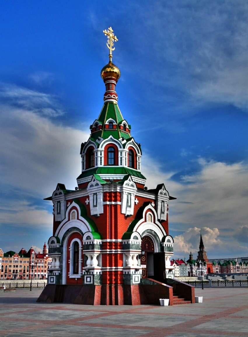 Часовня в честь святых Петра и Февронии Муромских в Йошкар-Оле освящена 8 июля 2011 года.